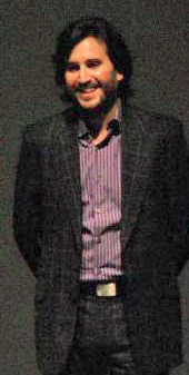 Peter Sollett at TIFF 08